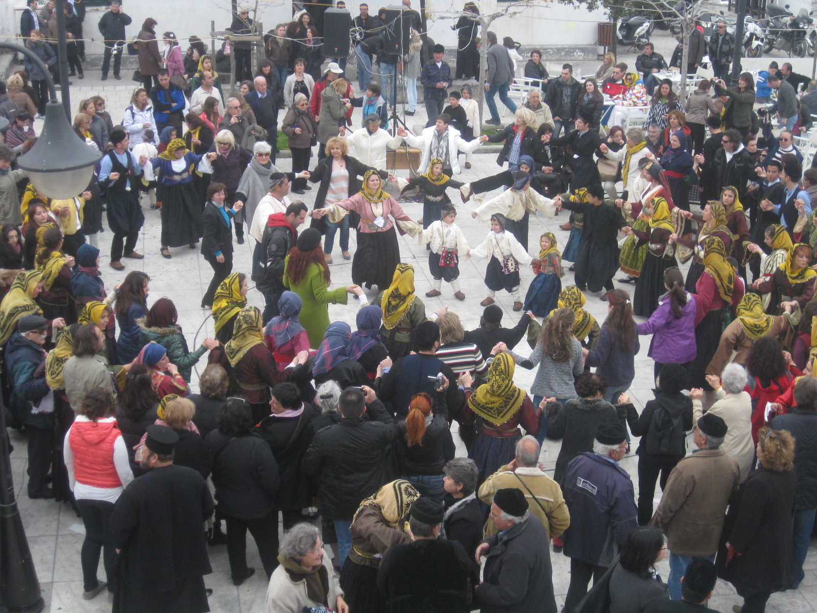 Danses du carnaval de Skyros sur la place centrale de la ville.